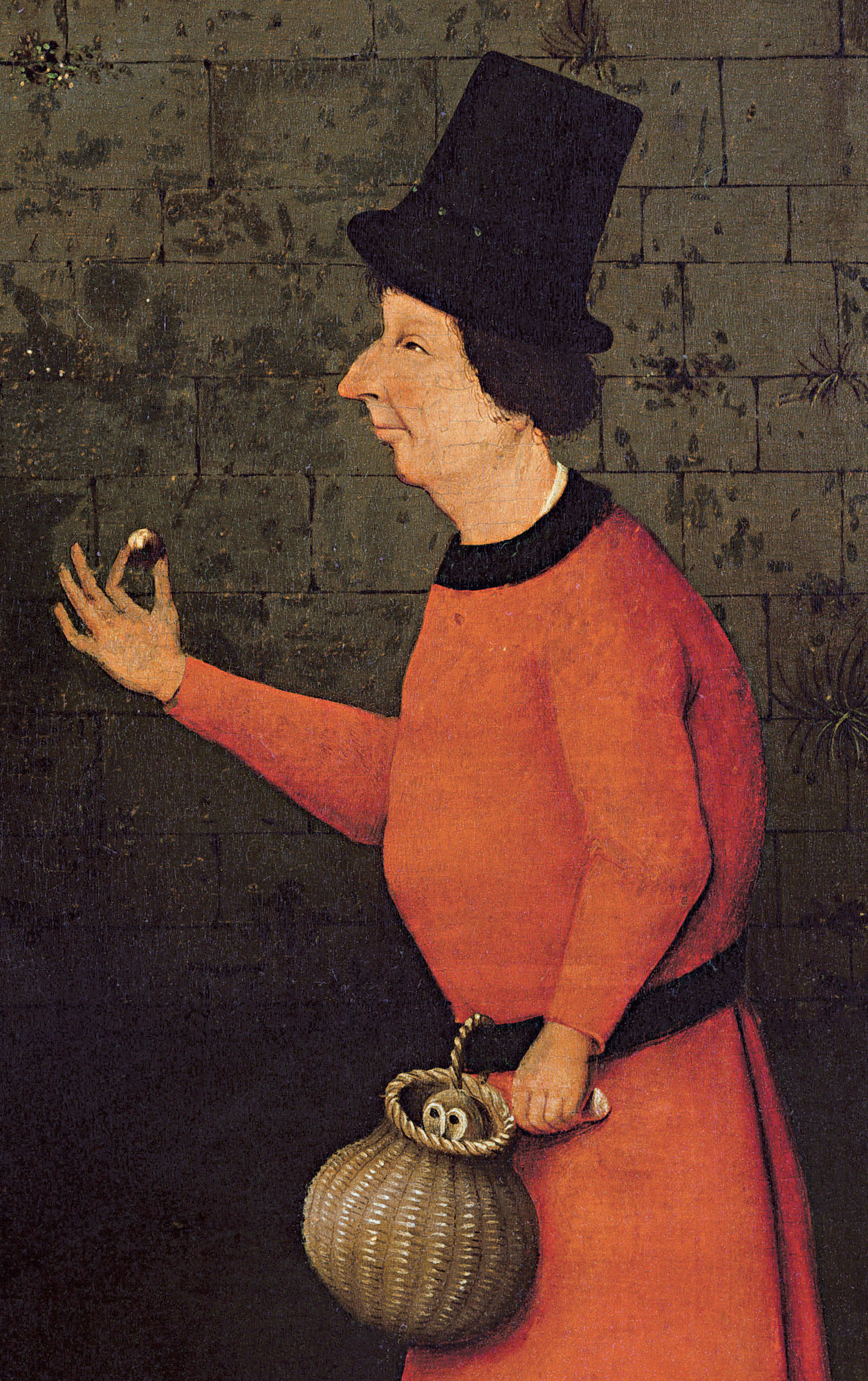 Détail de L'Escamoteur de Jérôme Bosch